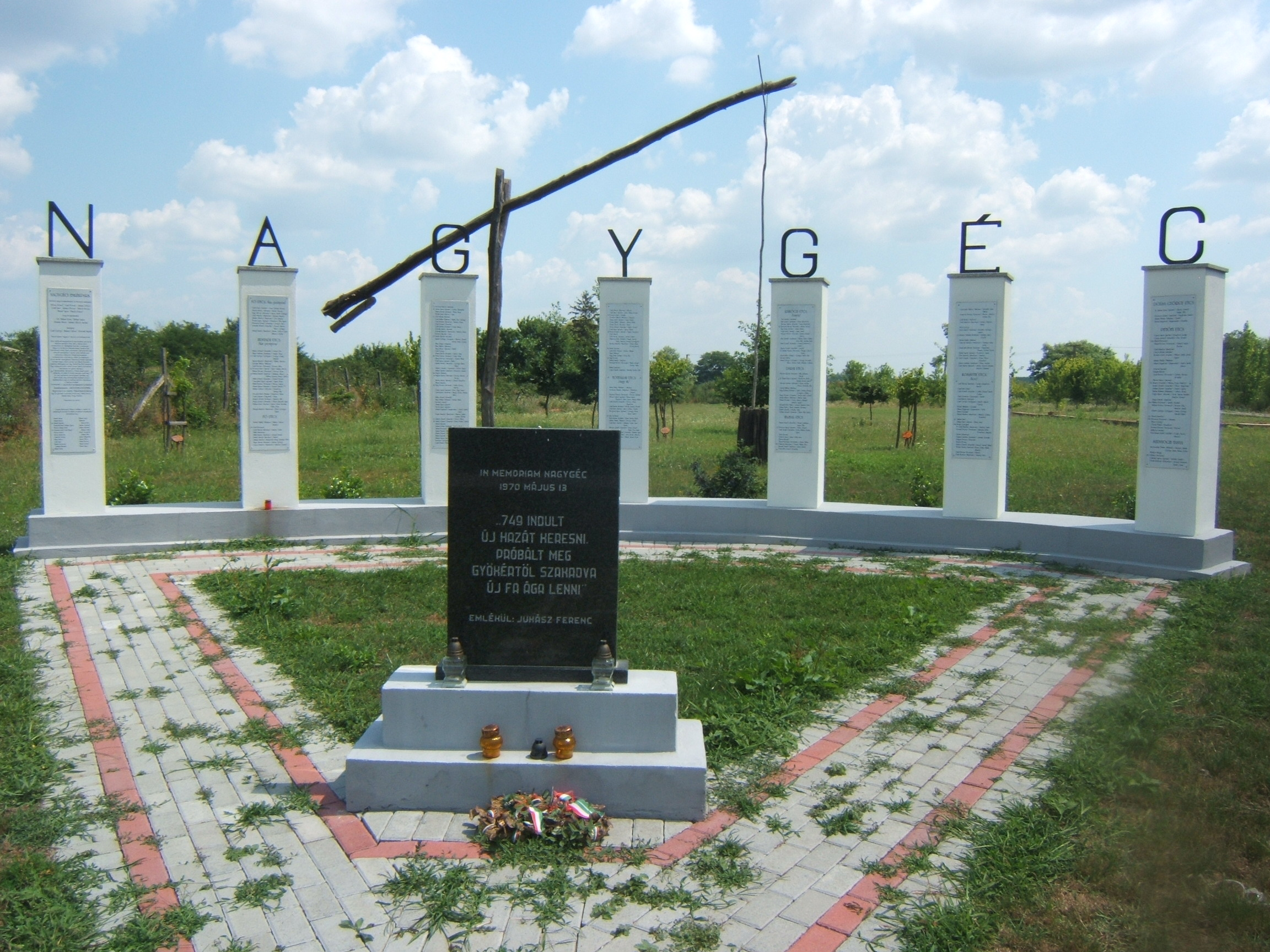 Nagygéci emlékpark (Szabolcs-Szatmár-Bereg megye)